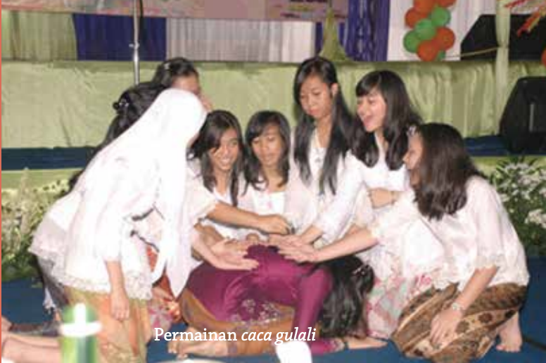 Caca Gulali